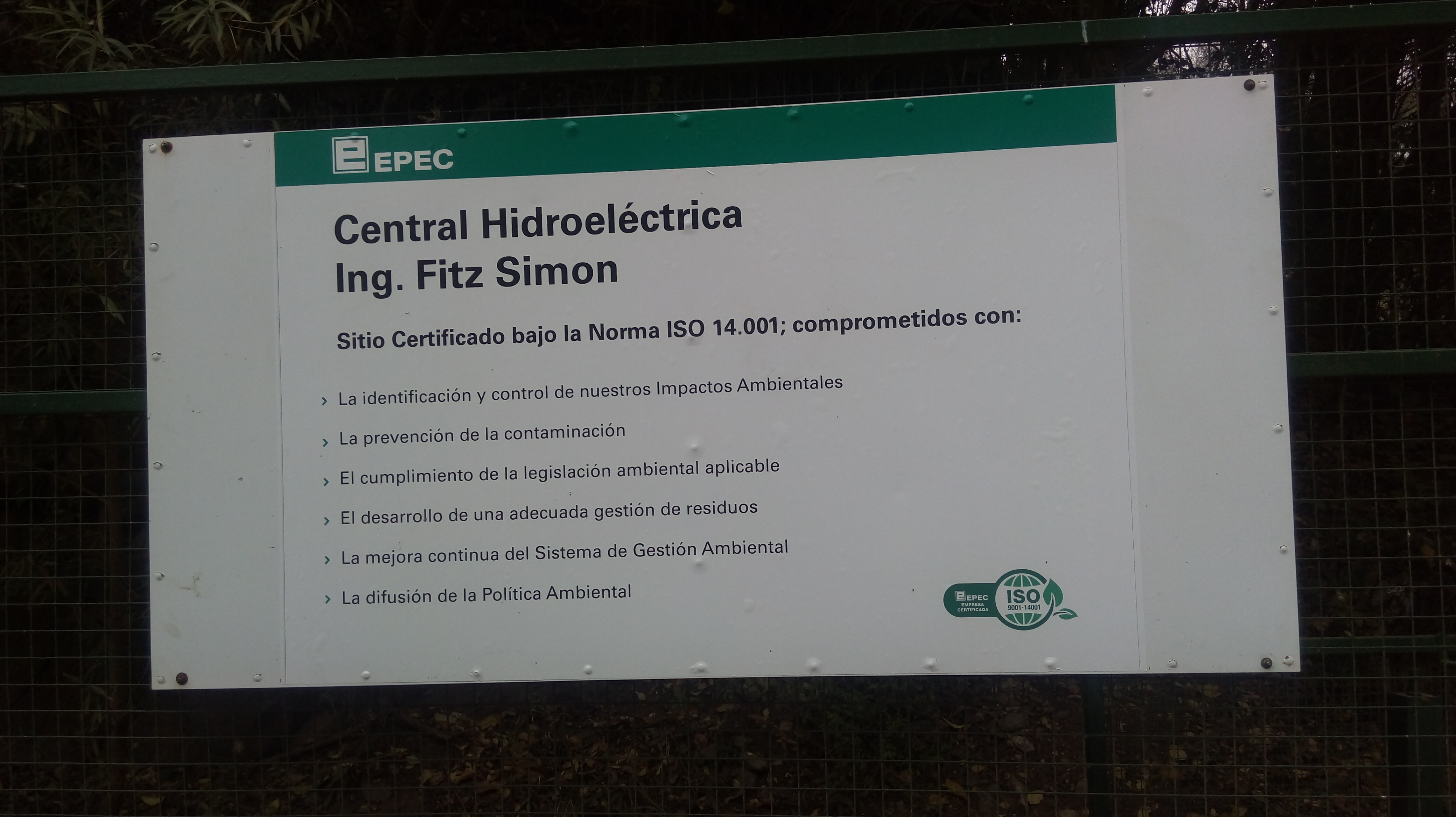 Información del sitio